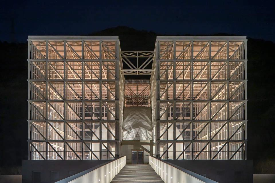 Prospettiva frontale serale del Planetario Giovan Battista Amico di Cosenza .